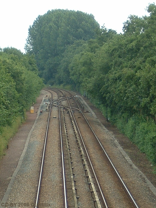 Wissel in metrospoor bij station Poortugaal - eigen foto.